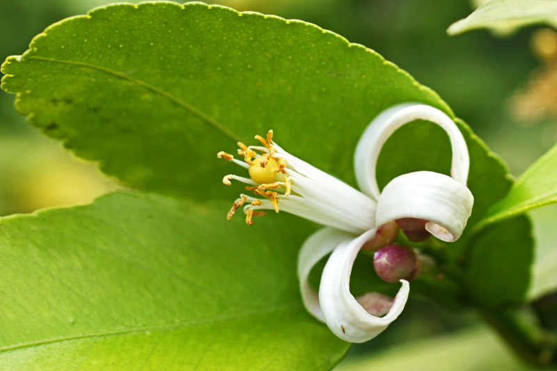 Orangenblüte und Knospe, Makroaufnahme